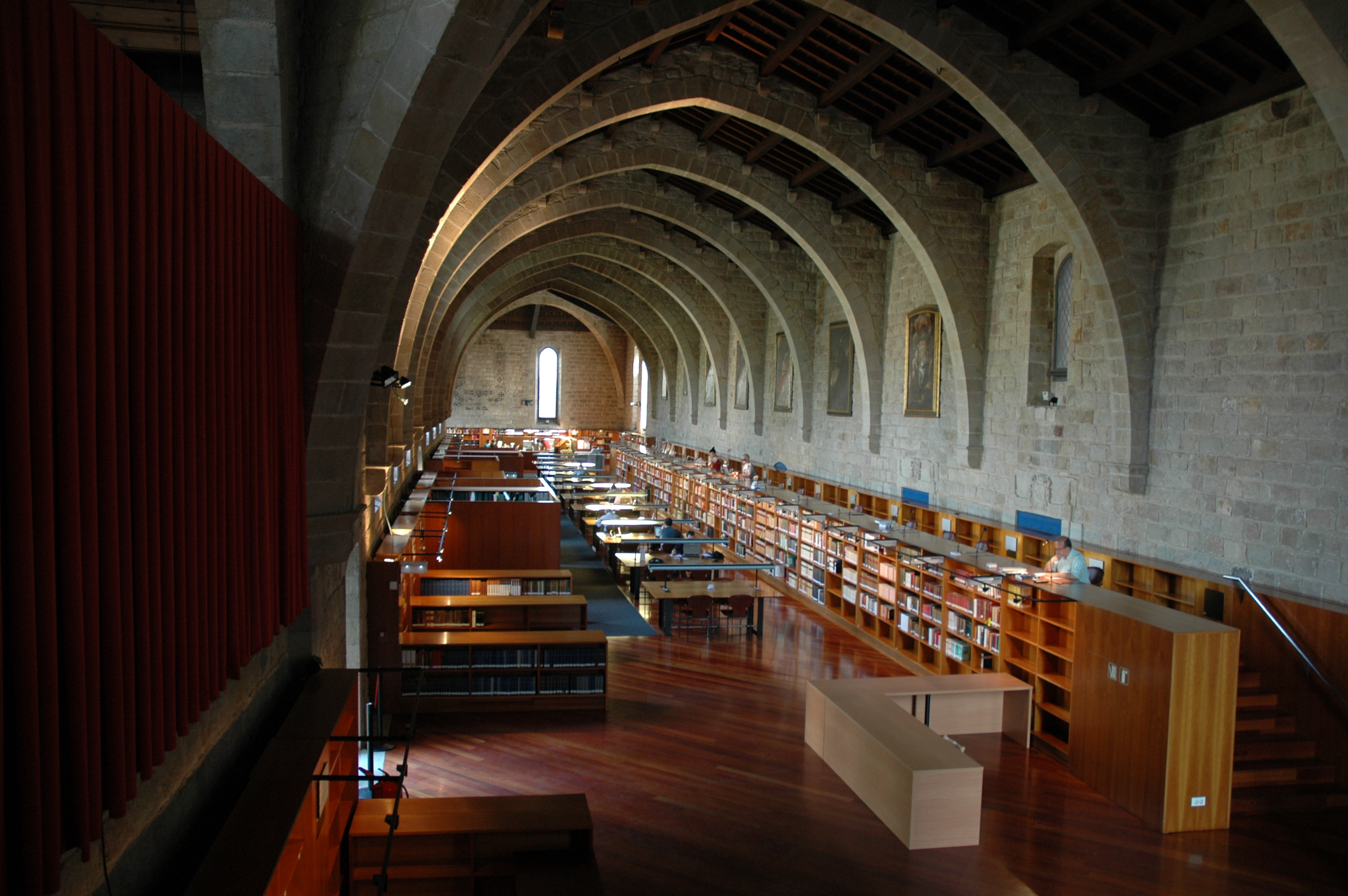 Biblioteca de Catalunya - Sala interior